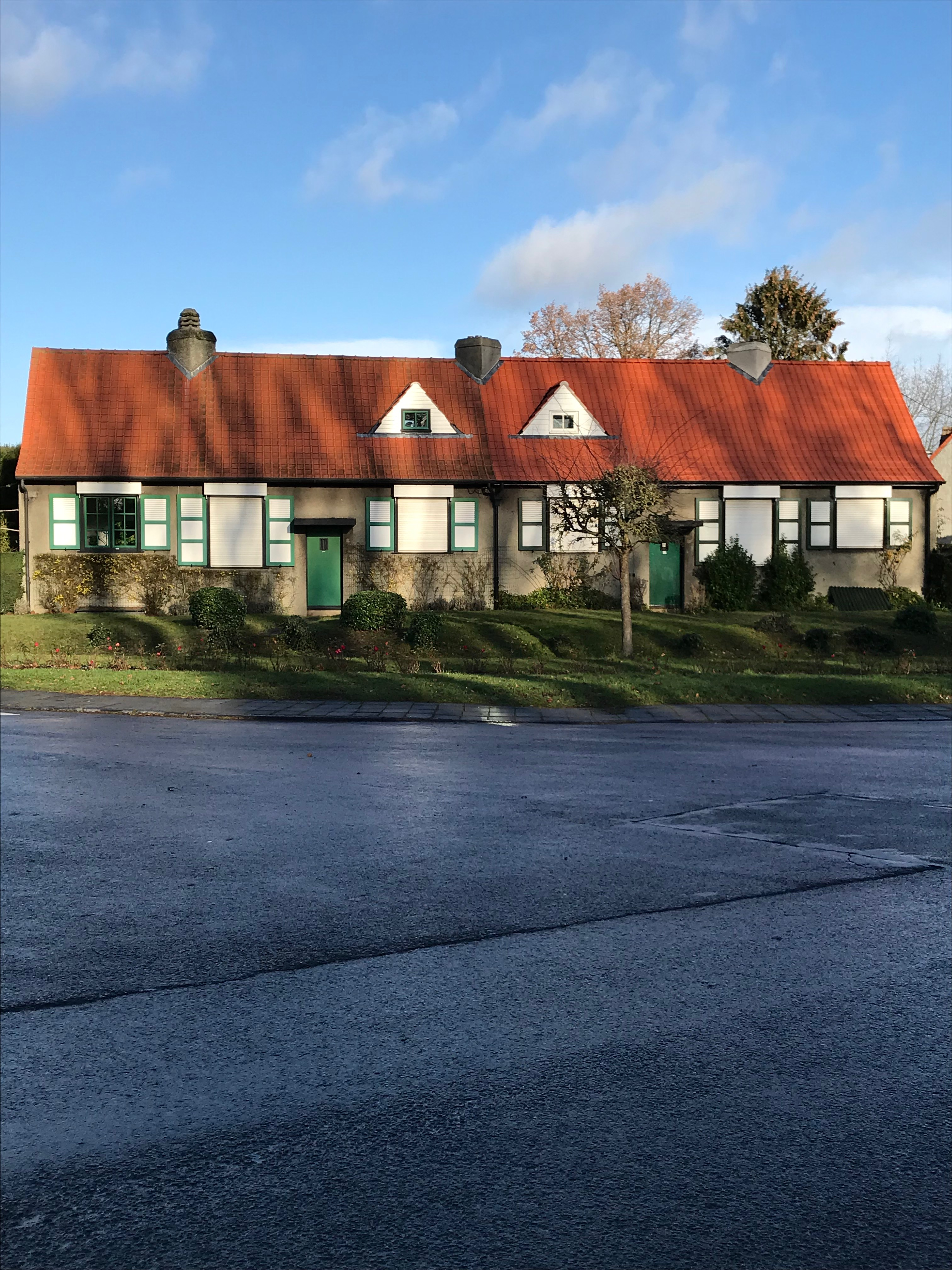 cité jardin le Logis